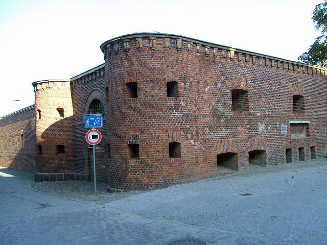 Gebäude bzw. Gebäudedetail in Stralsund. Straße und Hausnummer siehe Dateiname.